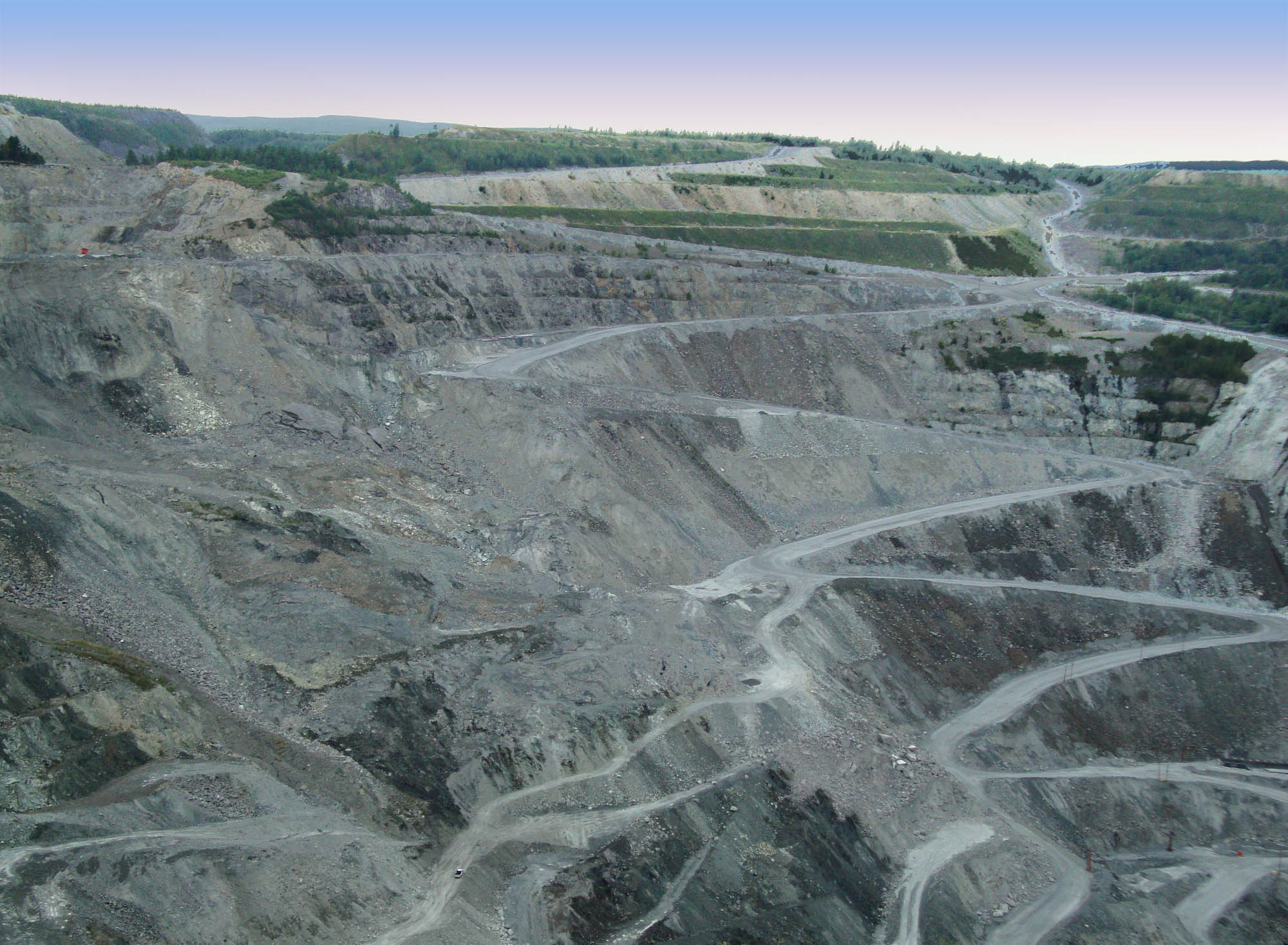 Camion sur le chemin de la mine d Asbestos